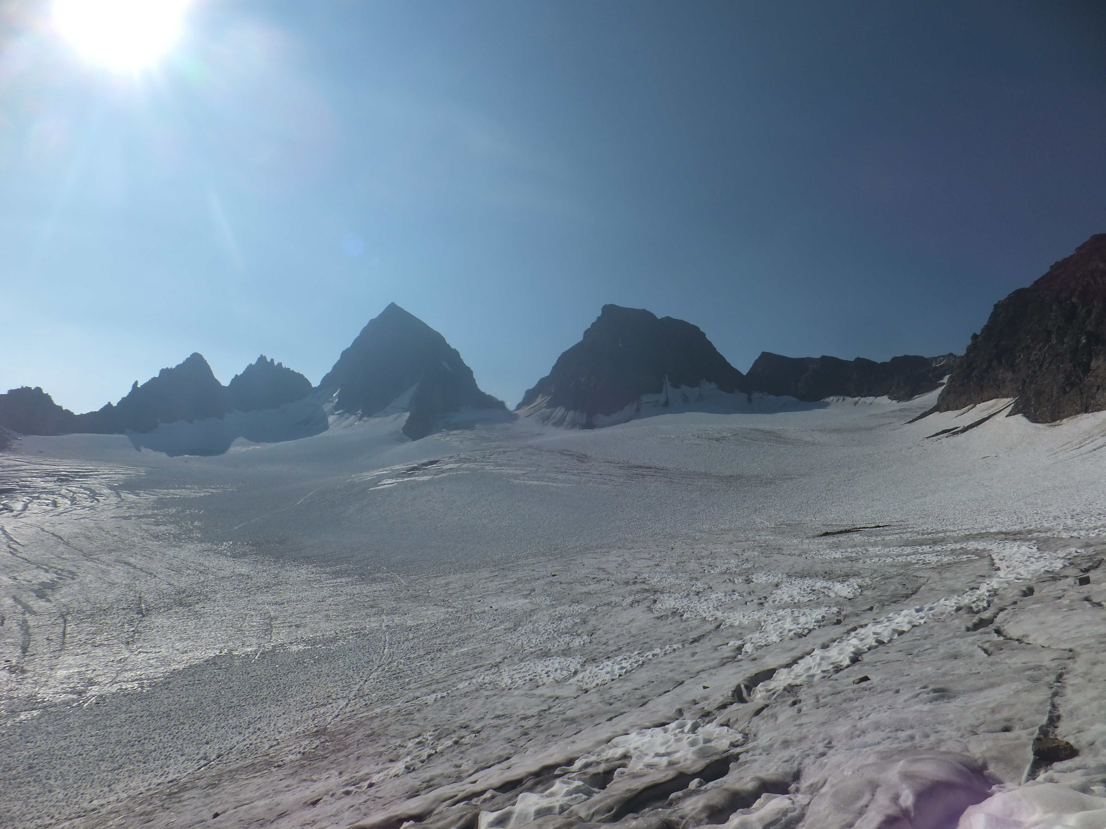 Piz Buin Grond (links) und Piz Buin Pitschen (rechts) vom Ochsentaler Gletscher. Dazwischen die Buinlücke.